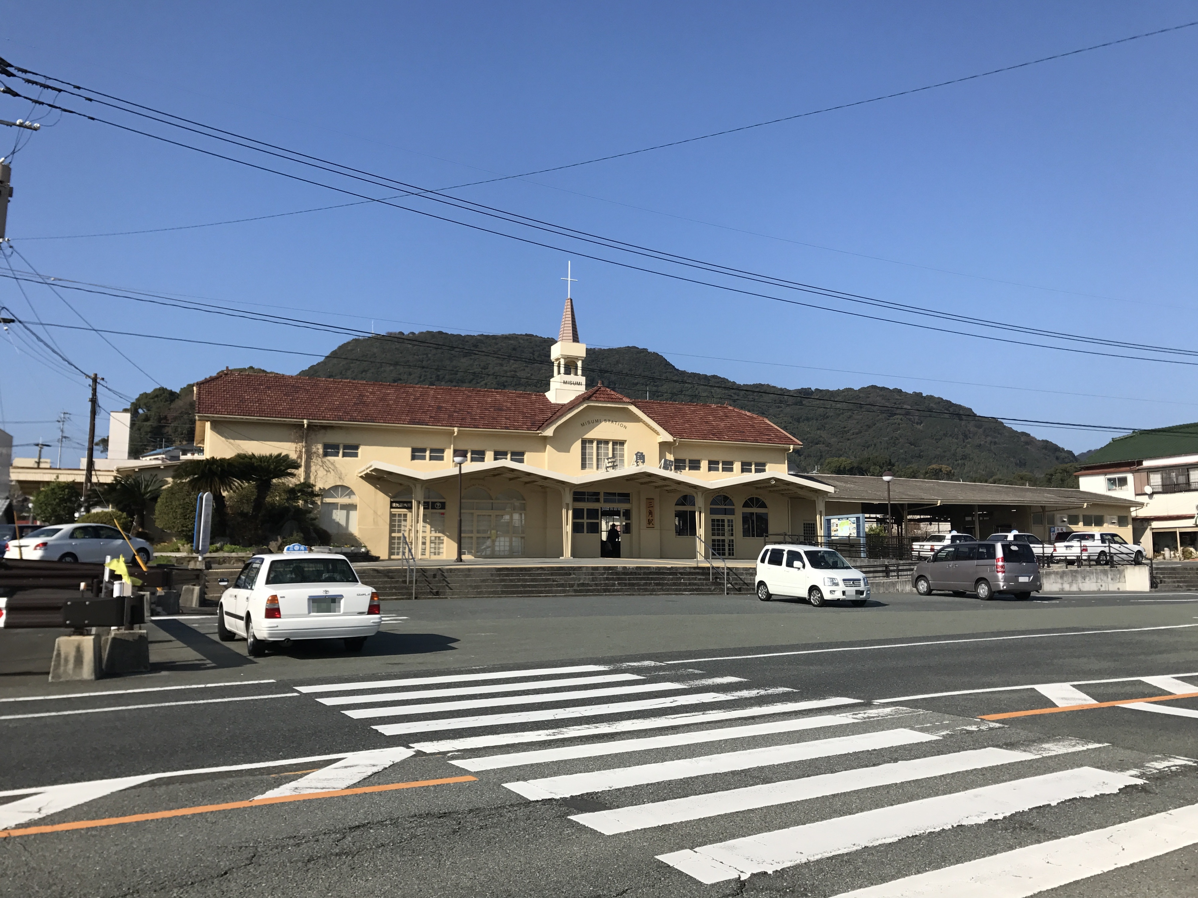 三角駅駅舎